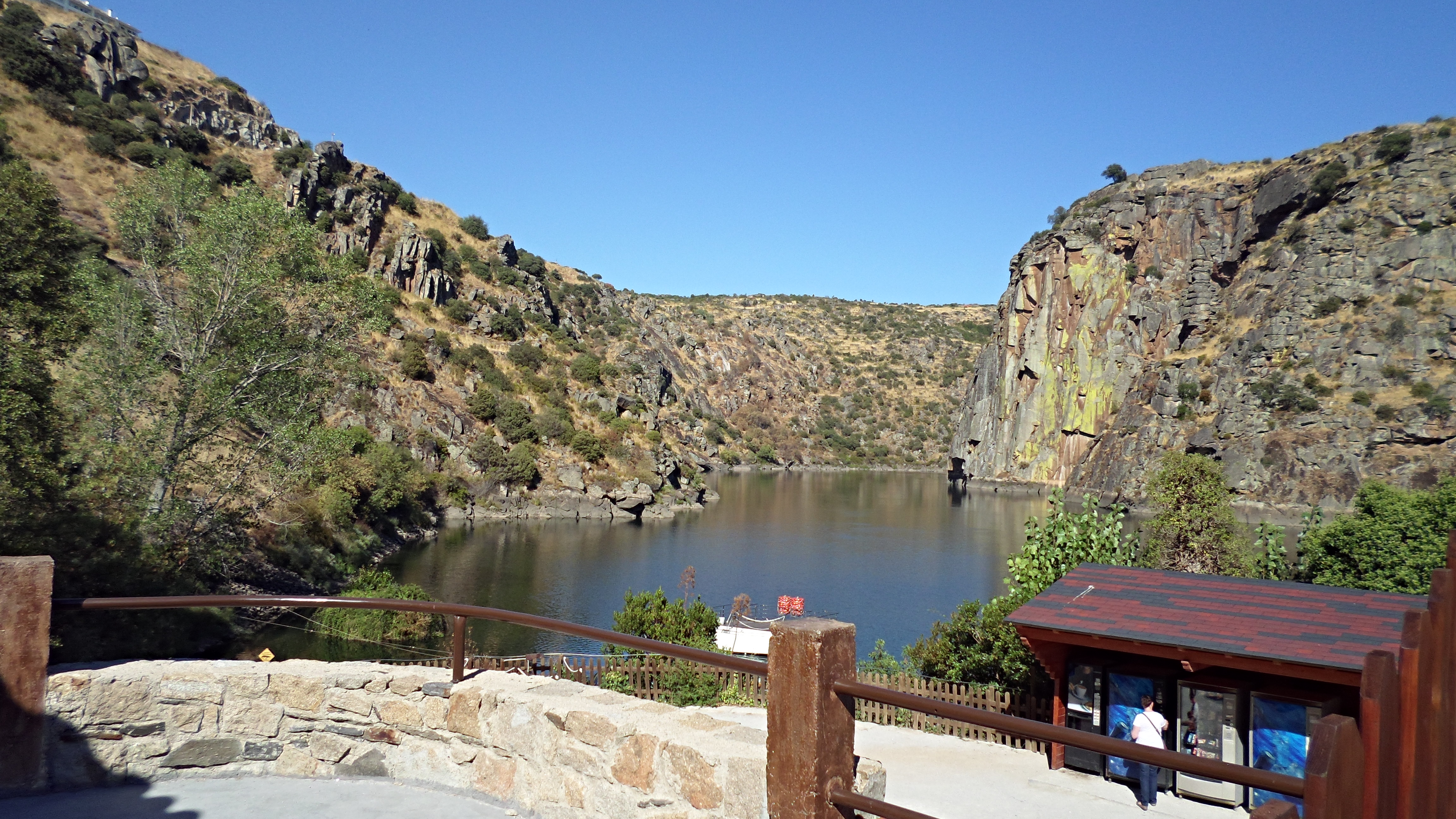 Arribes del Duero This is a photography of a Special Area of Conservation in Spain with the ID: ES4150096. Natura2000 entry, EEA entry